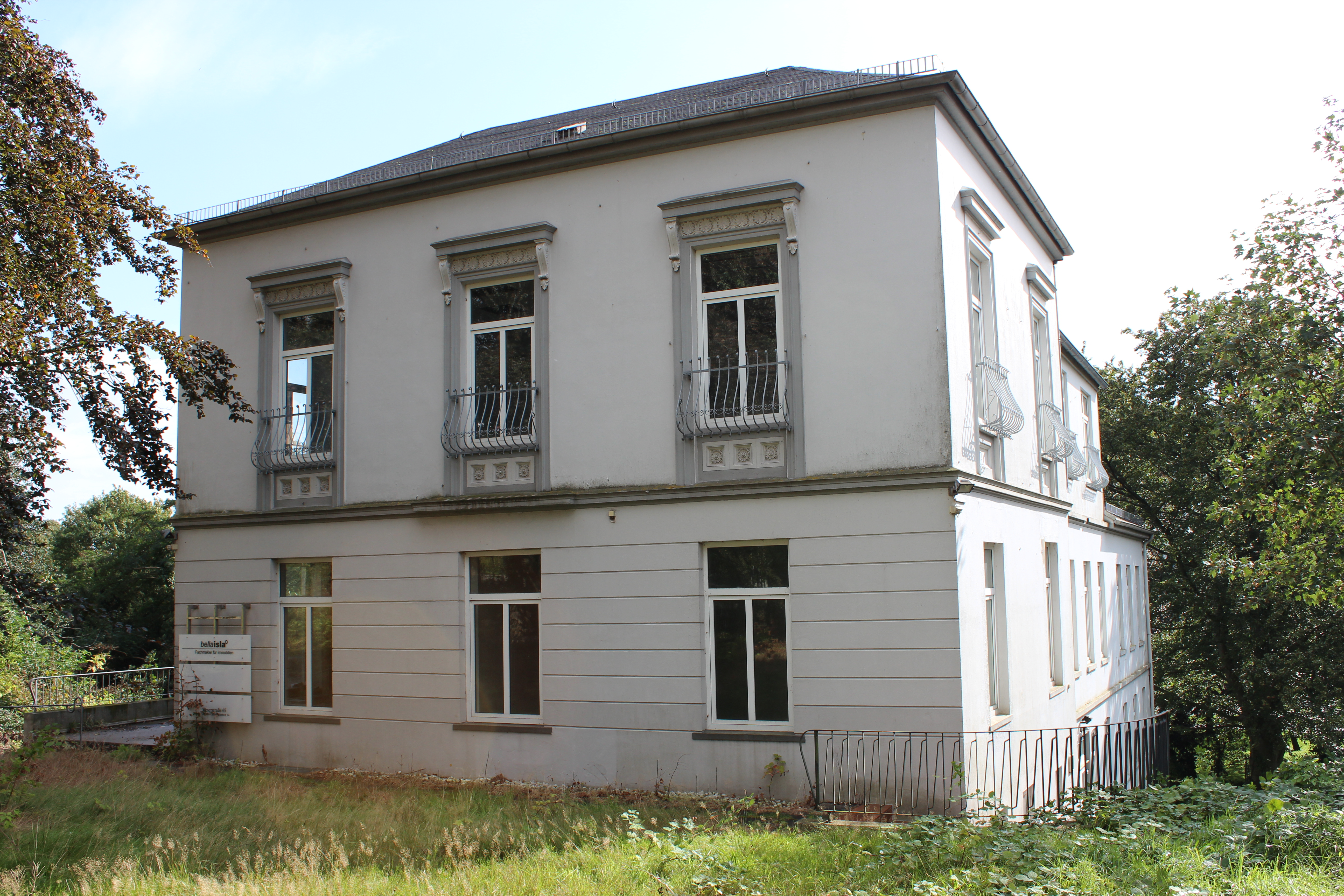 Ulrichs'sches Wohnhaus in Bremen, Weserstraße 65.Das abgebildete Objekt ist ein geschütztes Kulturdenkmal in der Freien Hansestadt Bremen, mit der Nr. 1916 beim Landesamt für Denkmalpflege registriert.